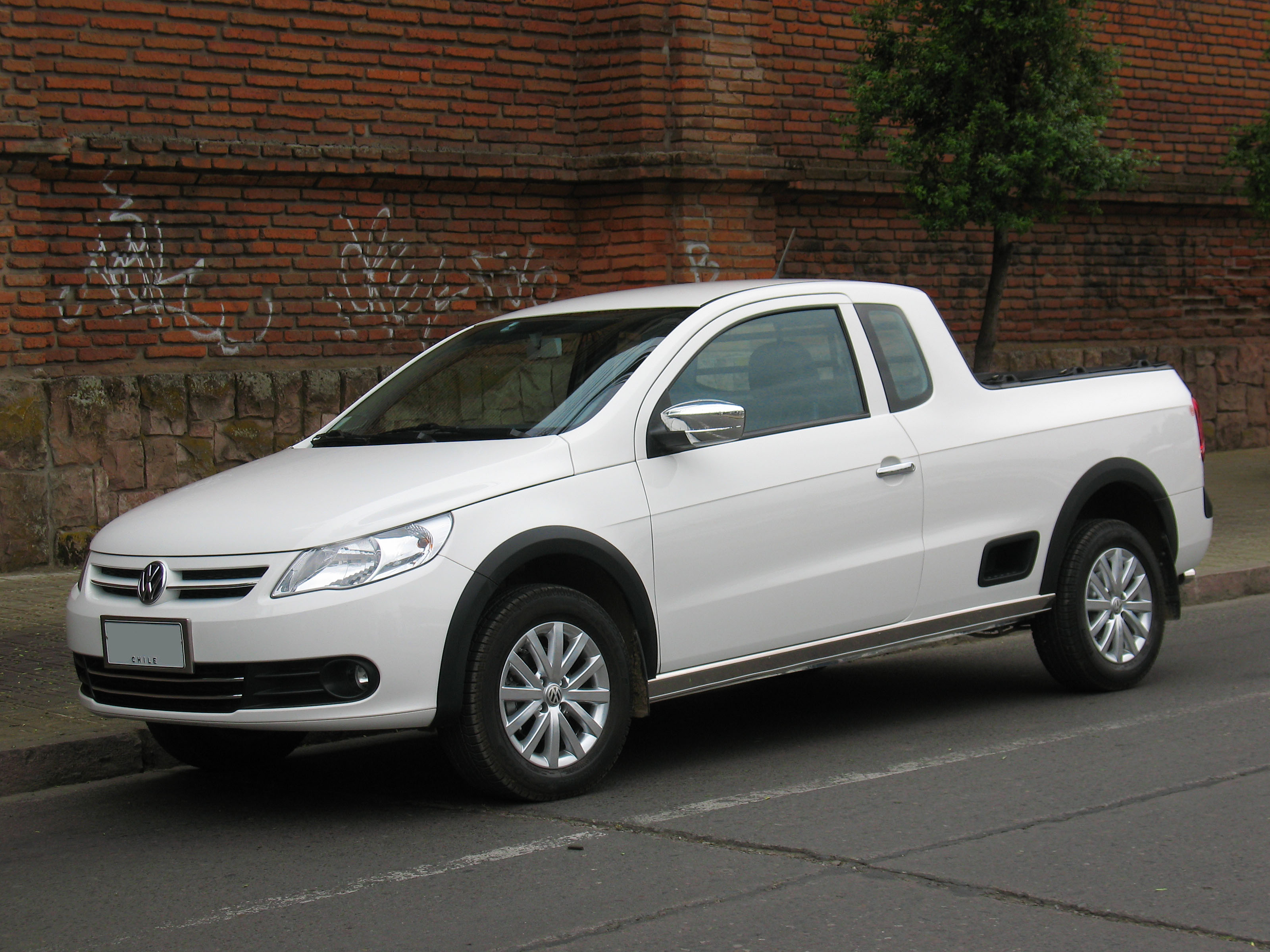 Volkswagen Saveiro 1.6 Comfort Cab 2013